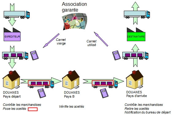 Schéma de fonctionnement d'un transport sous régime TIR